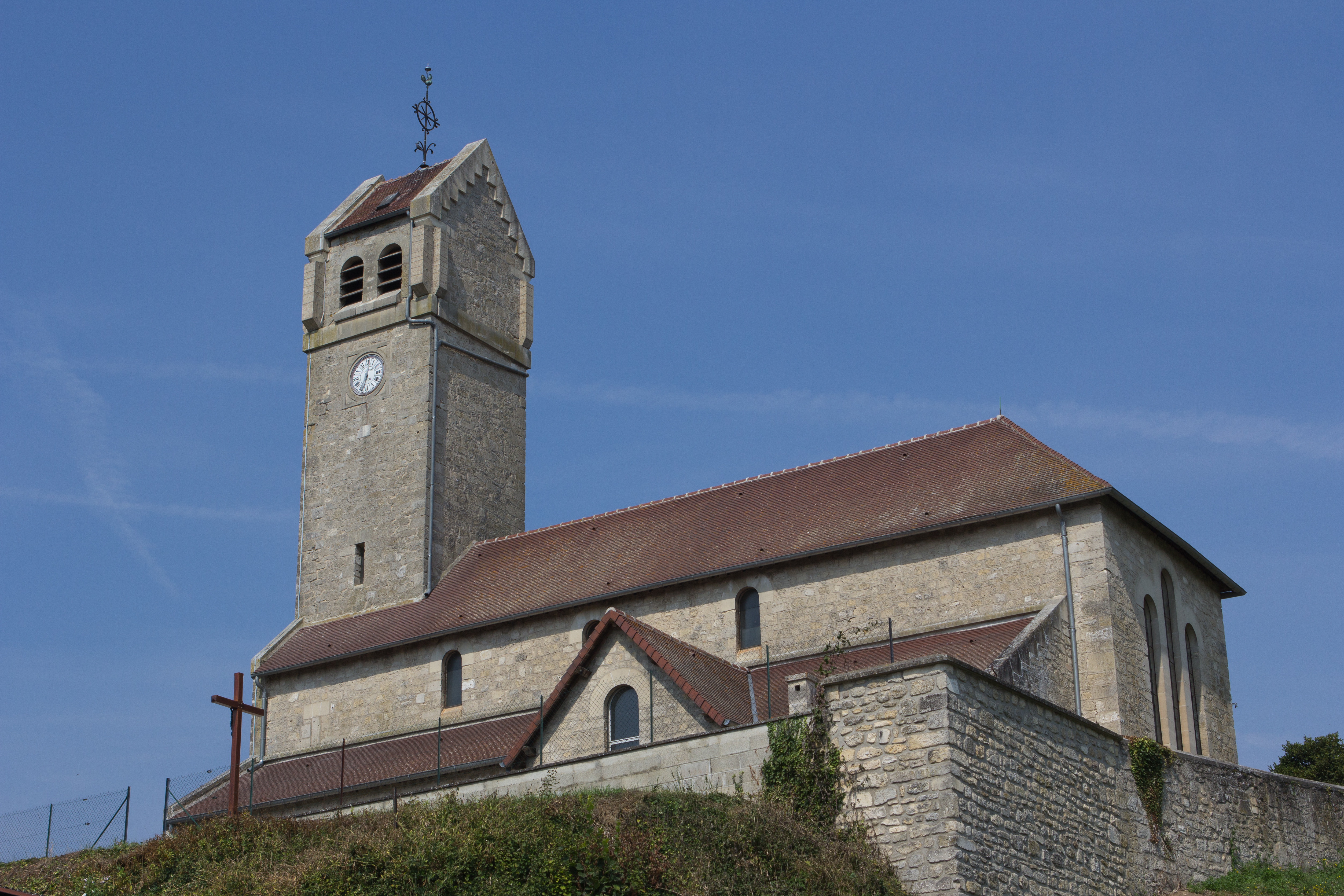 Église de Chamouille, Chamouille, Aisne, France